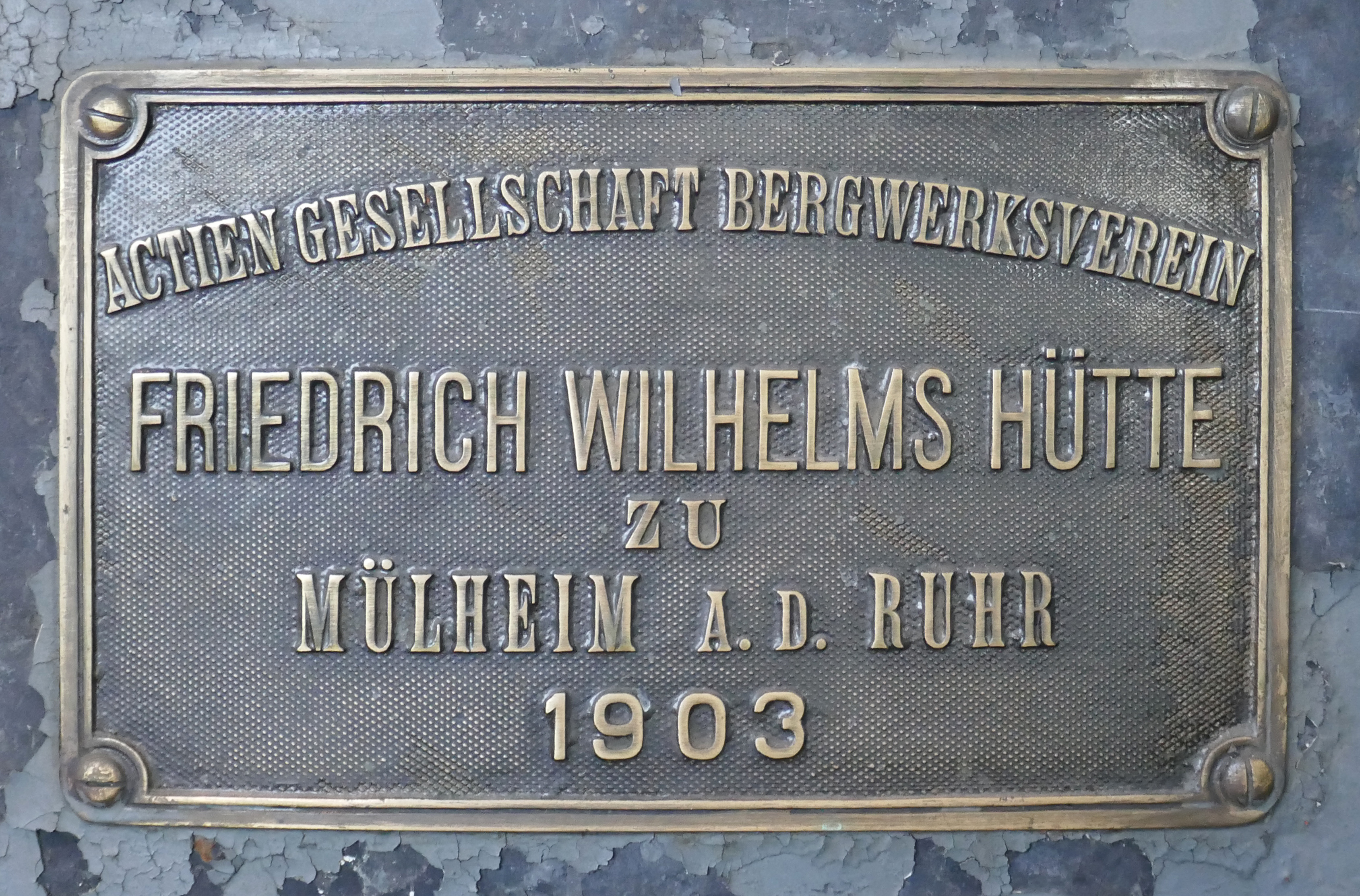 Wikipedia Stammtisch Ruhrgebiet, Zeche Zollern. Maschinenhalle - Firmenschild: Friedrich Wilhelms-Hütte.